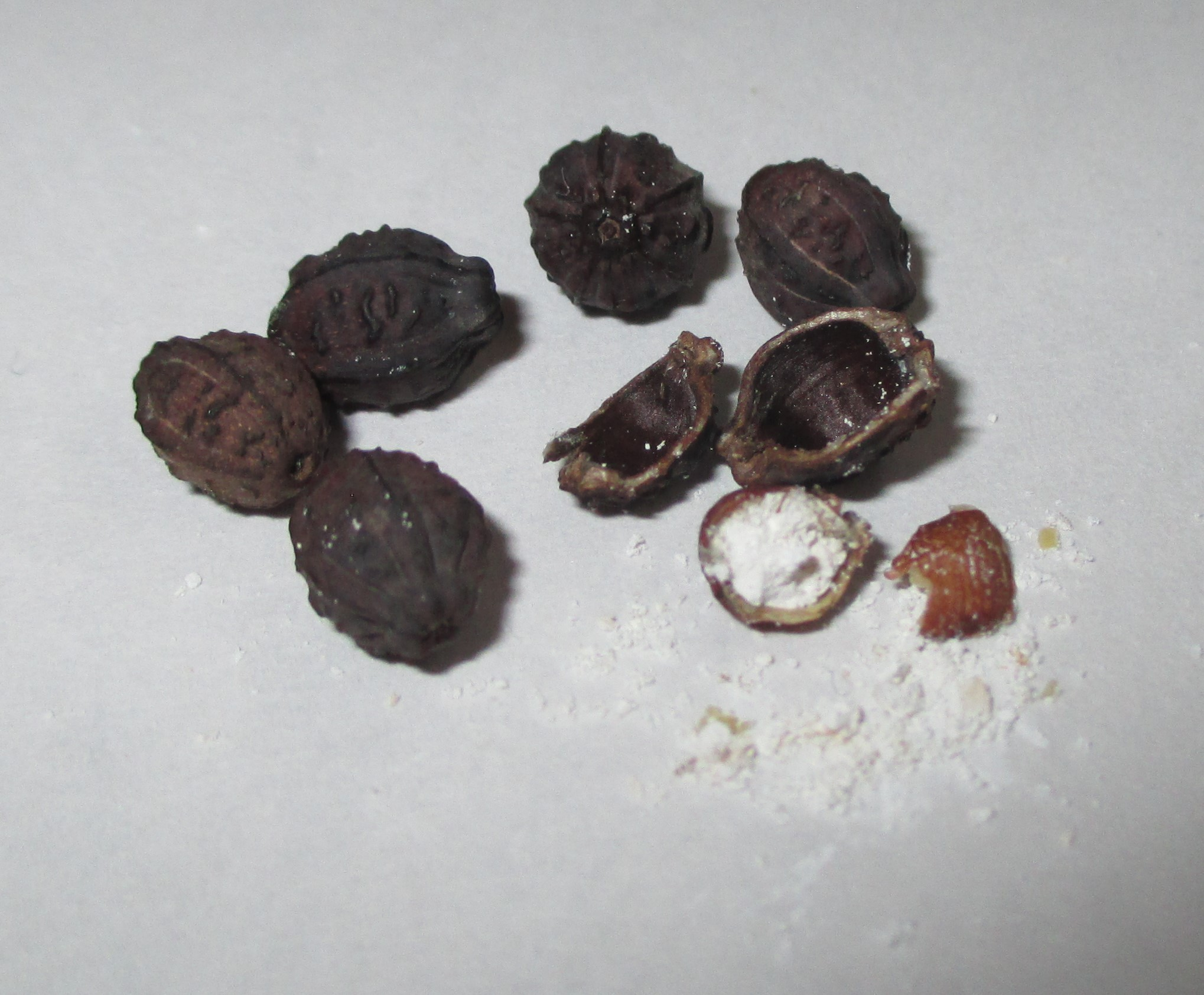 オシロイバナの種子と、和名の由来となった白い粉状の胚乳。